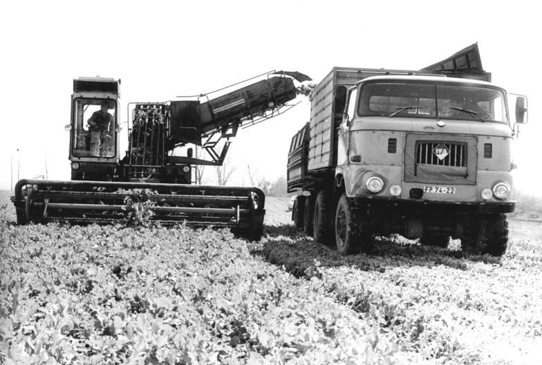 LPG Andisleben, Grünfutterernte ADN-ZB Ludwig-18.4.88 Bez. Erfurt: Grünfutterernte Mit der ersten Ernste dieses Jahres haben die Bauern der LPG Pflanzenproduktion Andisleben (Kreis Erfurt-Land) begonnen. Dem Schnitt von Futterrüben folgt der nahtlose Übergang zu anderen Grünfutterkulturen. Damit werden zwei Milchviehanlagen und eine Jungrinderaufzucht versorgt.